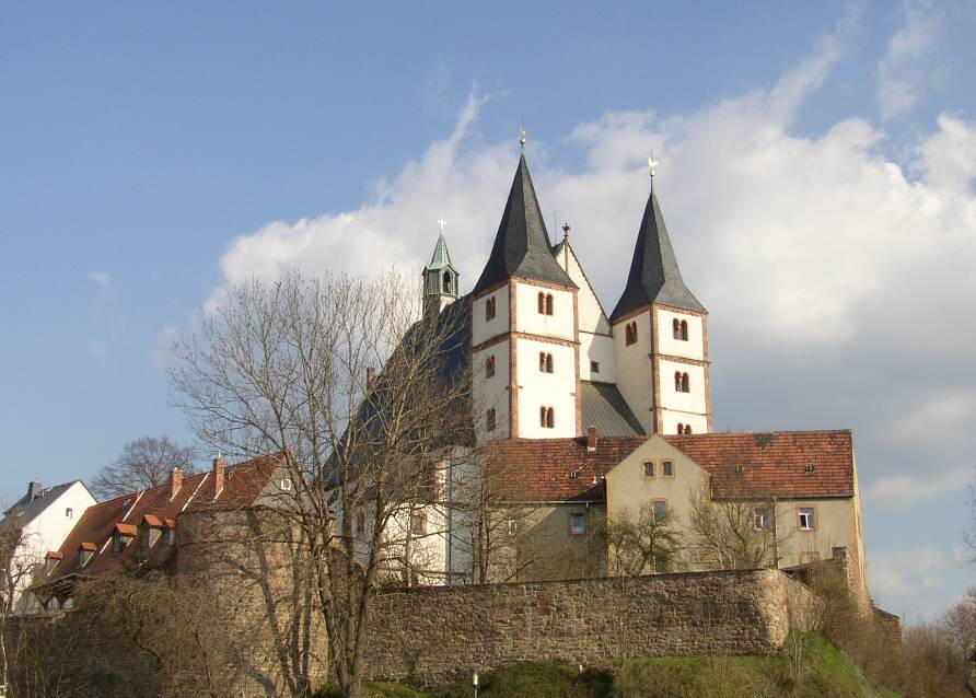 Die Geithainer Nikolaikirche